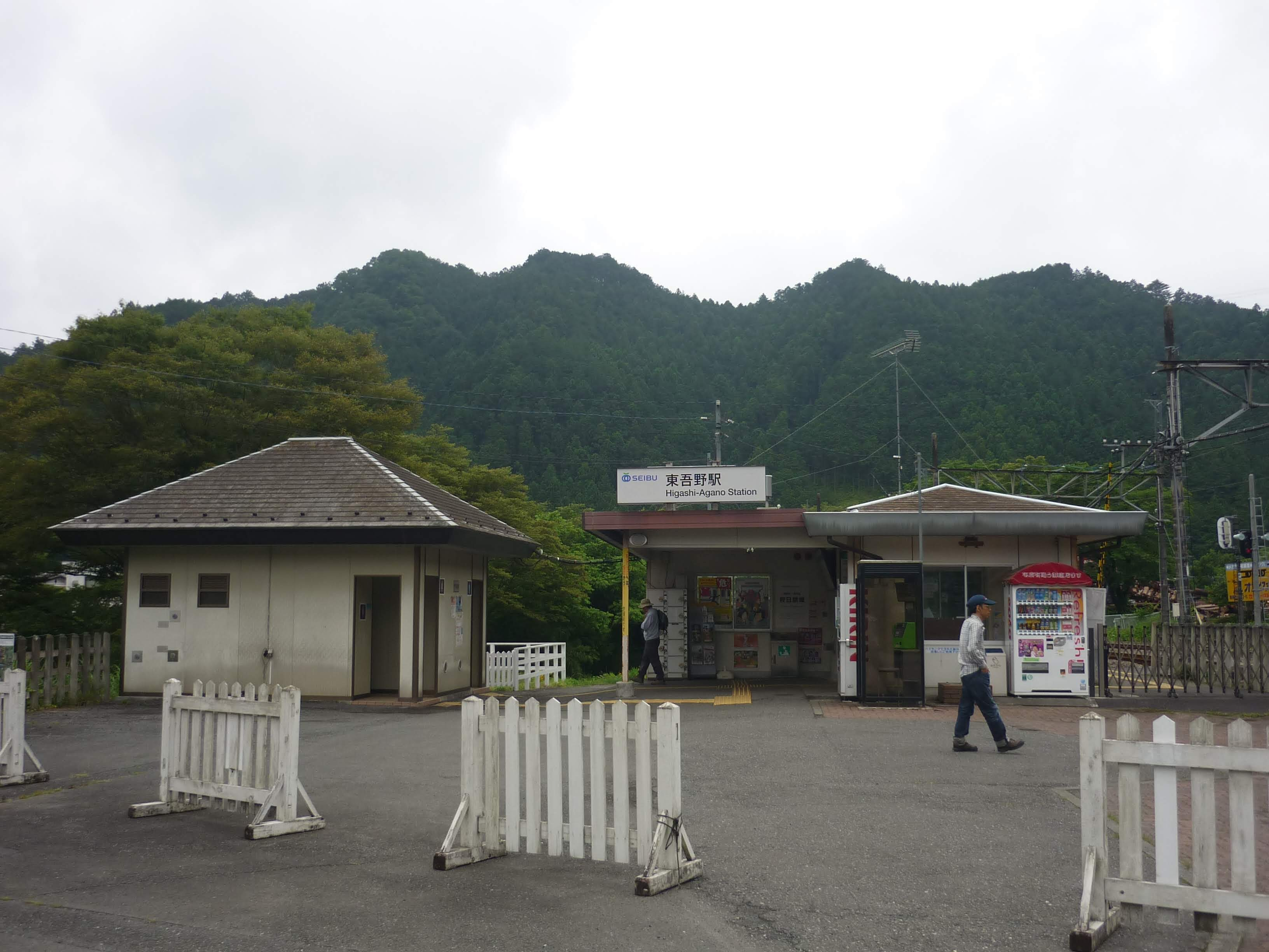 西武東吾野駅